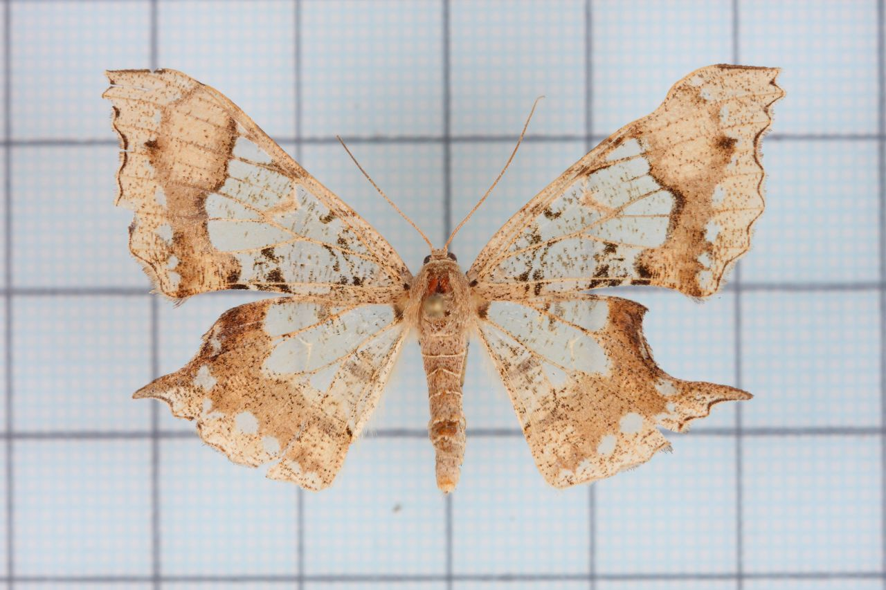 Krananda semihyalina Moore 1867 玻璃尺蛾 鞍1P.22,Pl.4-2 female